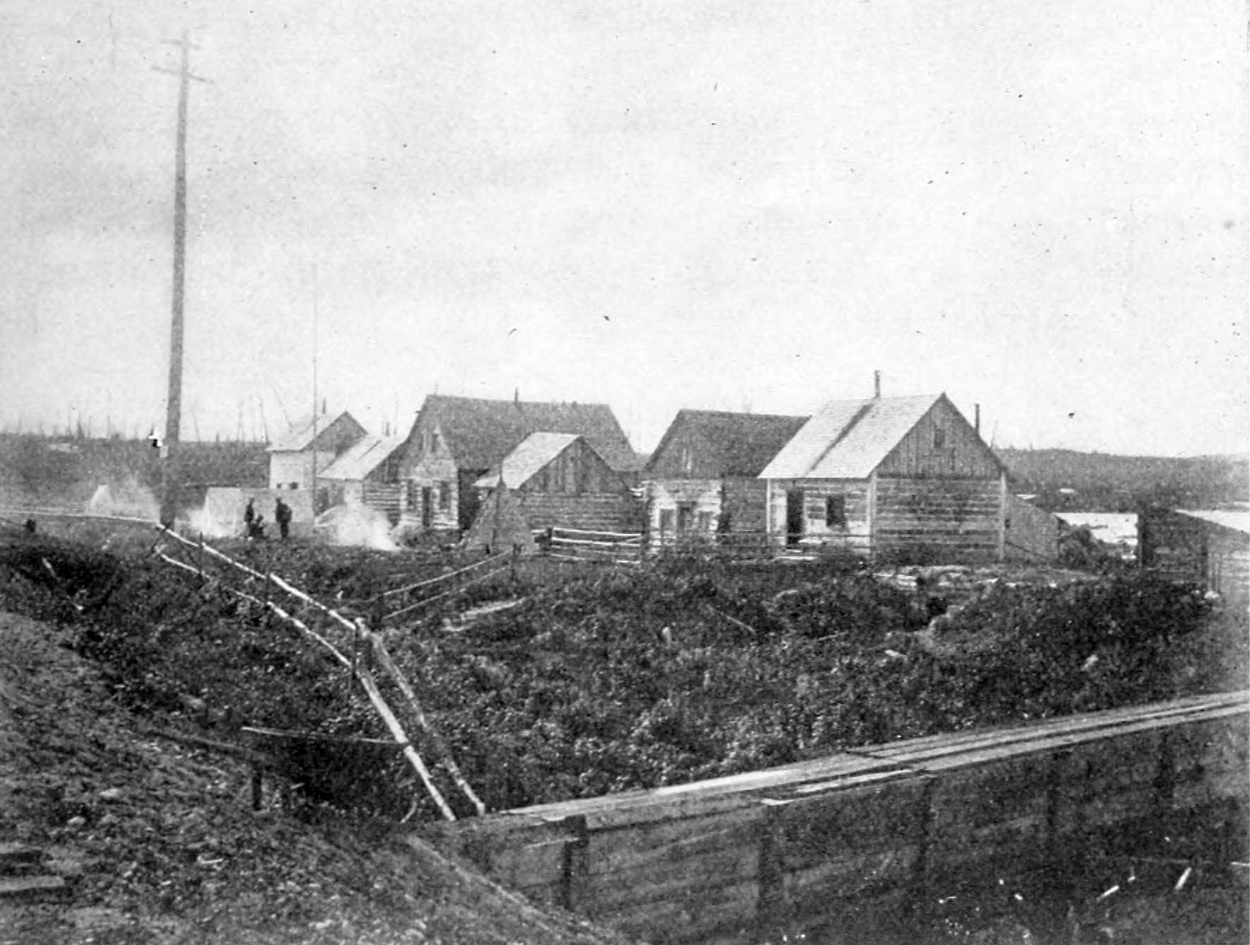 Missanabie, Ontario.